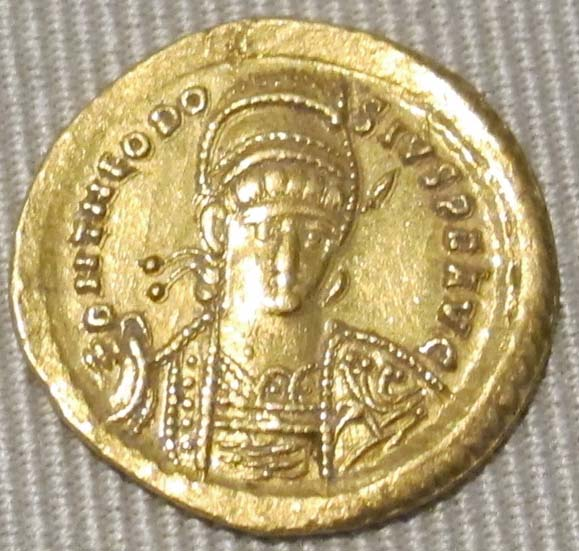 Impero d'oriente, teodosio II, solido in oro (costantinopoli), 439-450